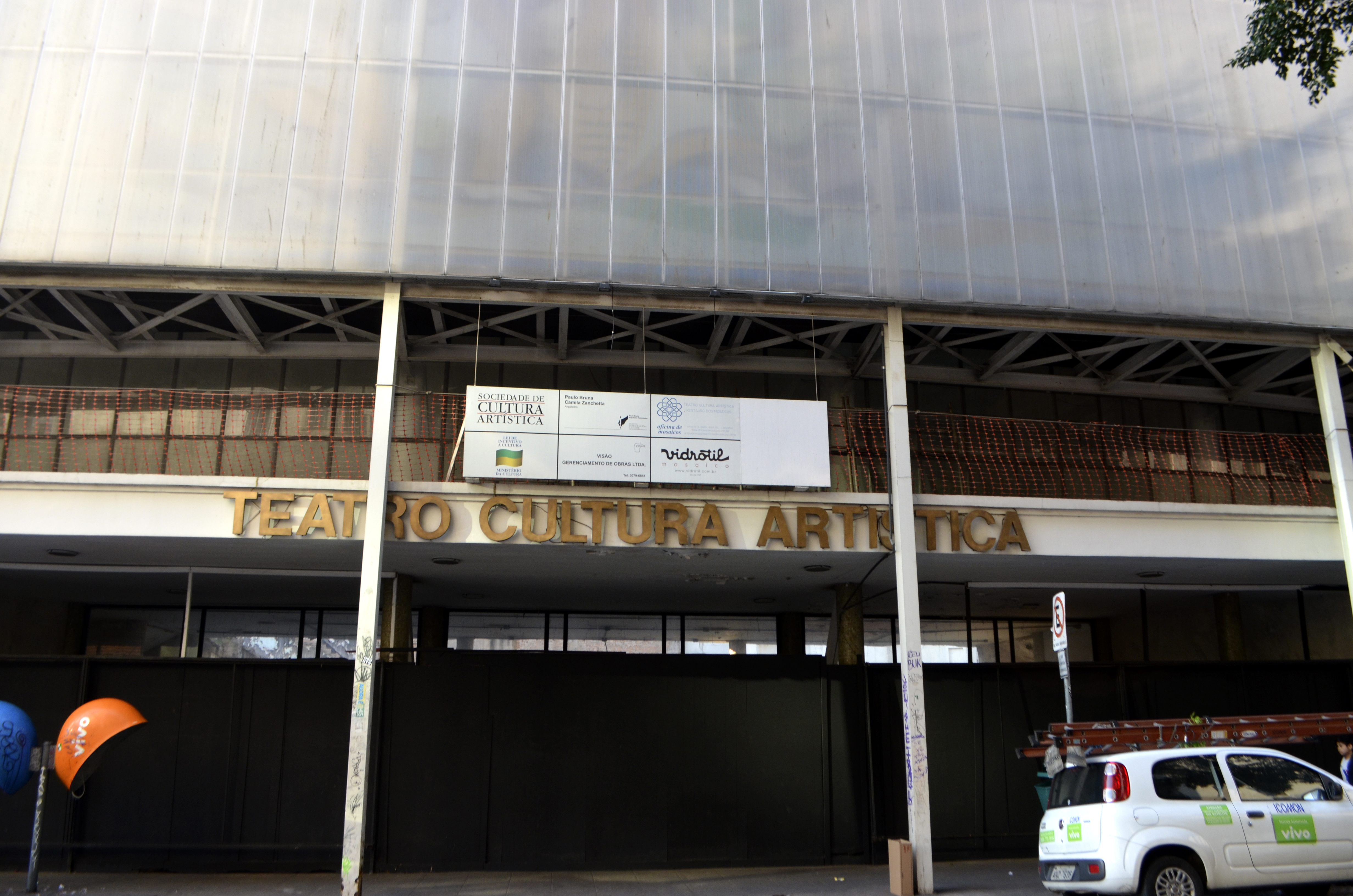 Fachada conservada do incêndio do Teatro Cultura Artística, em São Paulo (SP), Brasil